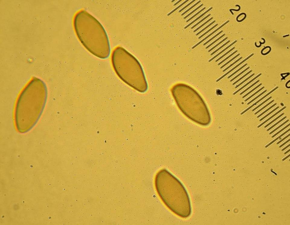 Xerocomus rubellus (Krombholz) Quélet